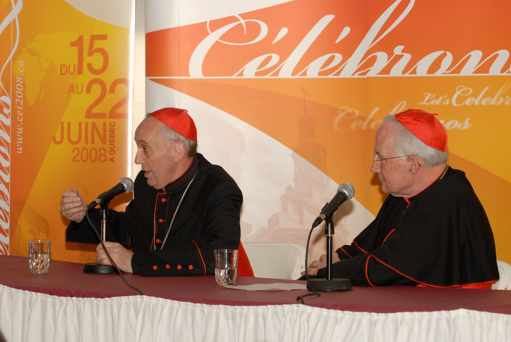 Le cardinal Bergoglio en conférence de presse à la suite de sa conférence au CEI 2008.